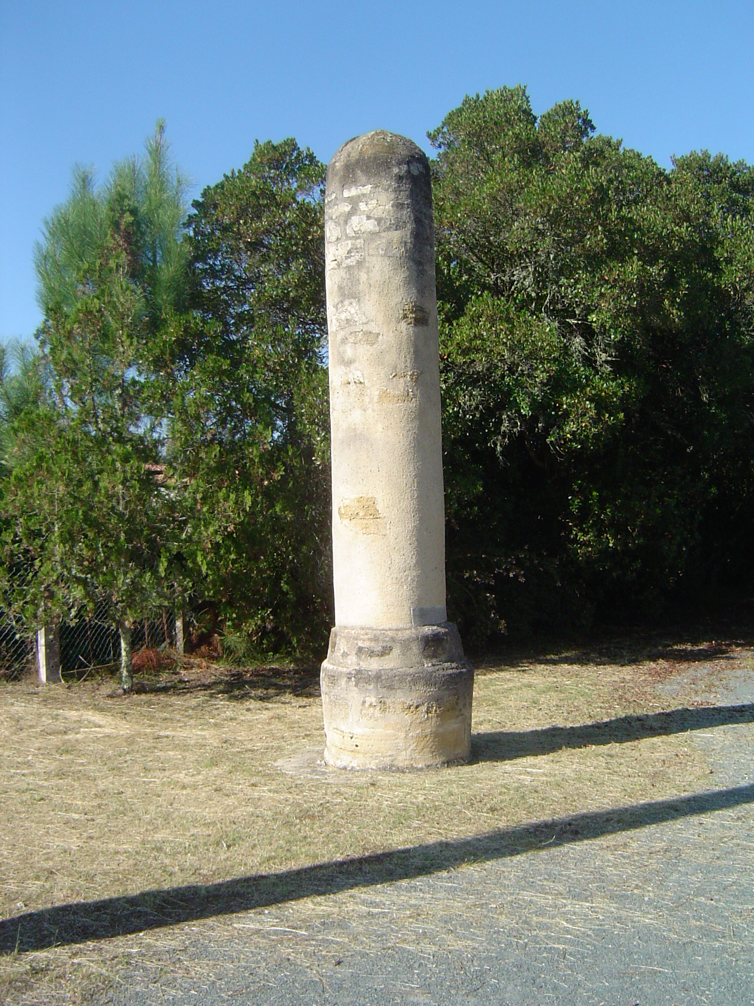 Borne de la sauveté de Saint-Girons du Camp ; Vielle-Saint-Girons ; Landes ; France